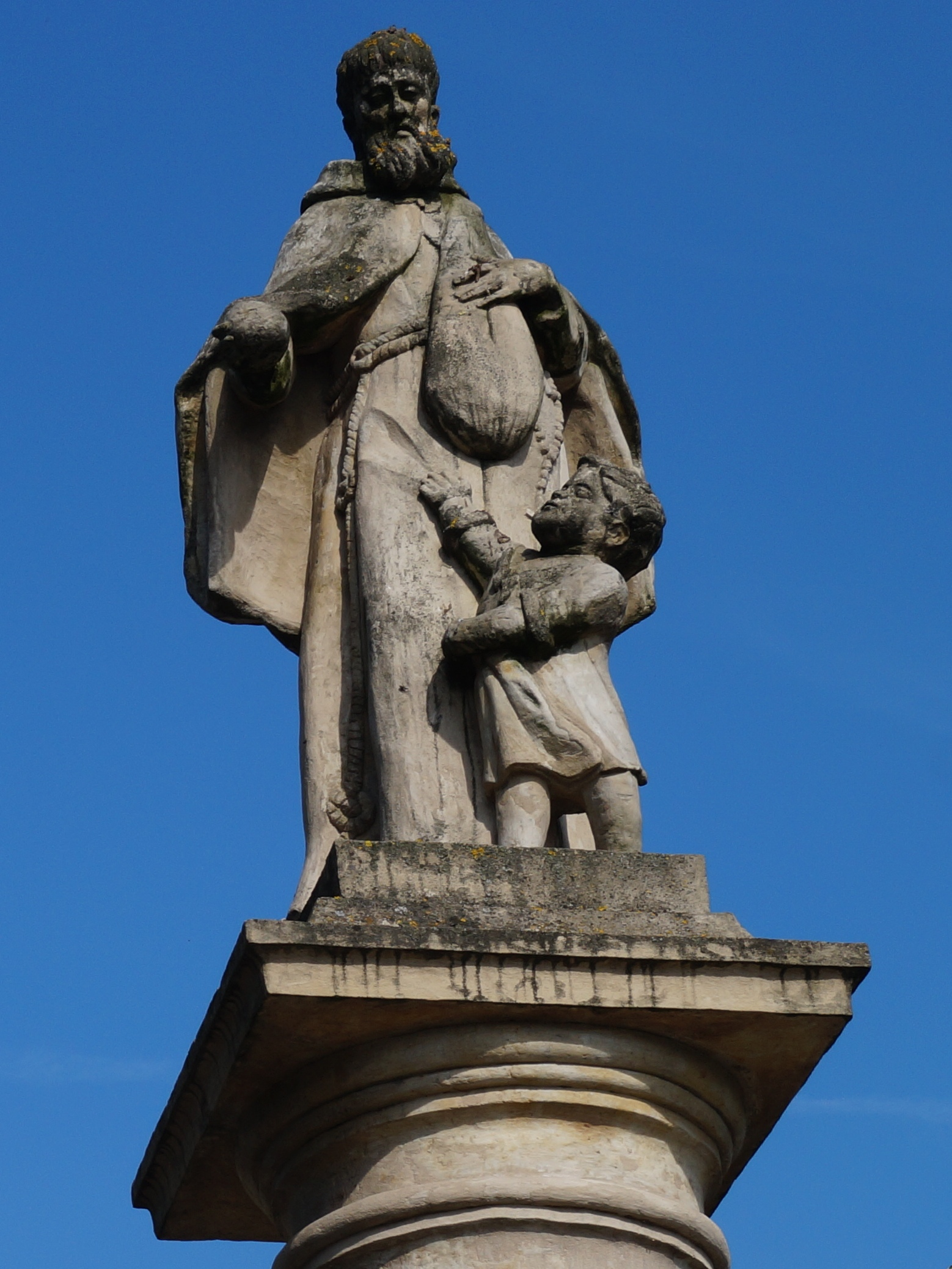 Przed kościołem OO. Kapucynów pw. Zwiastowania Najświętszej Maryi Panny w Rozwadowie (dzielnica Stalowej Woli) znajduje się umieszczona na kolumnie figura św. Feliksa z Kantalicjo, kapucyna.